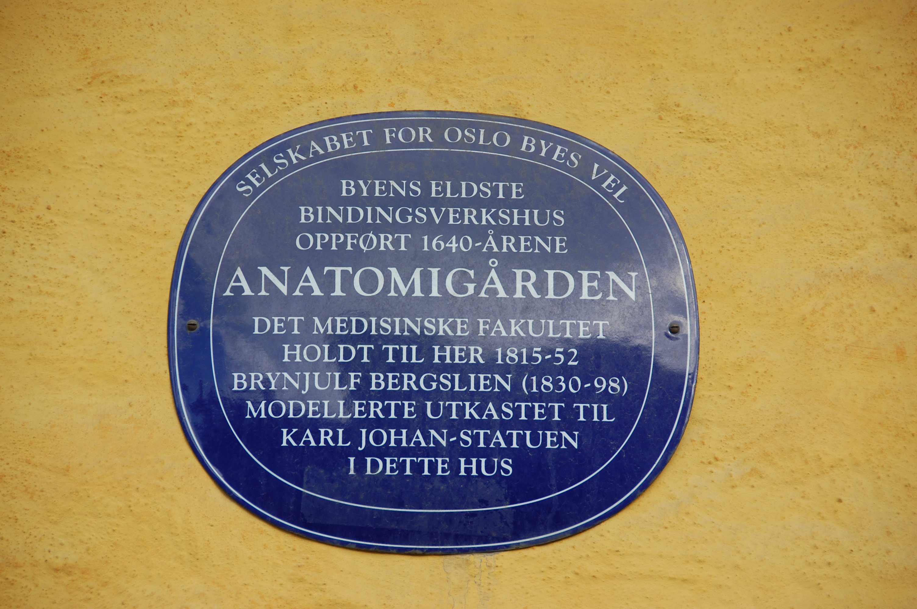 Anatomigården Kulturhistorisk skilt